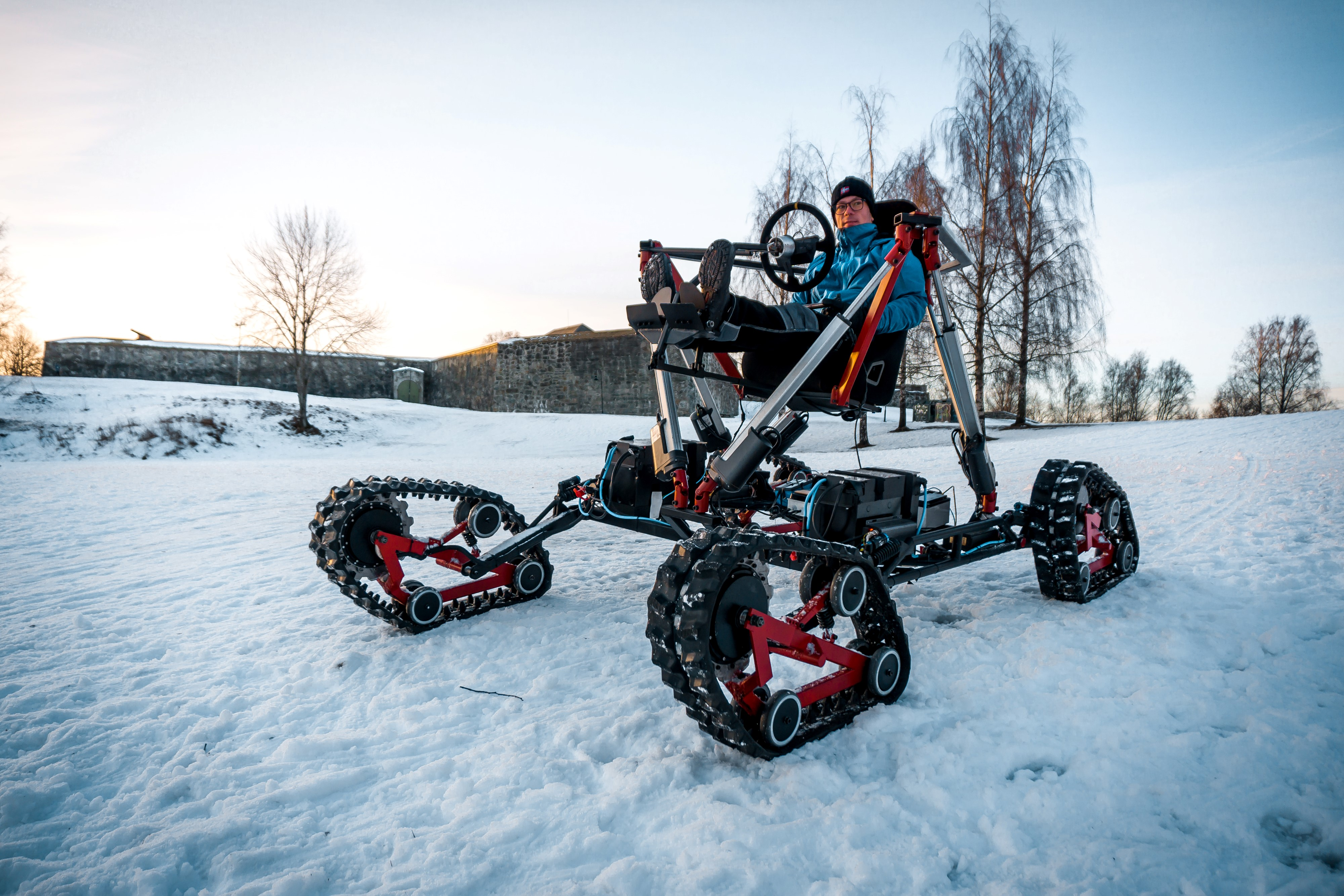 Testkjøring av prosjekt Kapra på vinterføre